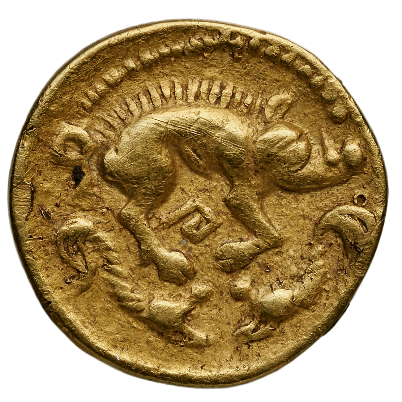 Quart de statère région Armorique. Revers : Sanglier à gauche, deux carnyx en dessous (?). Or, 2,1 gr. diamètre 12 mm, vers -100. Collection BnF : 6921A (GAU-7254)